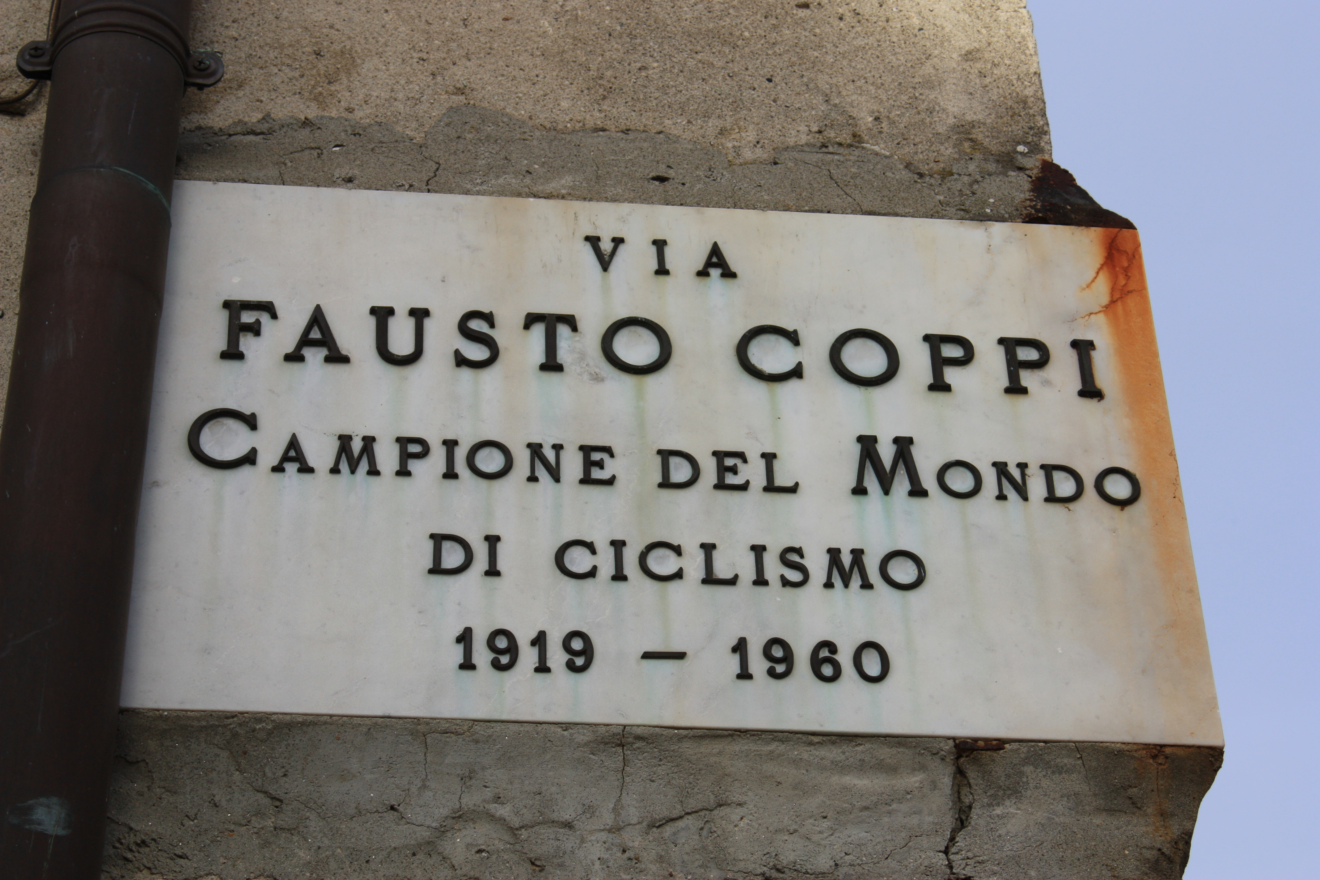 via Fausto Coppi a Castellania (AL), suo paese natale.